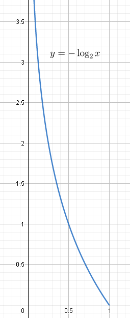 Probabilitate bati dagokion informazio kantitatea erakusten duen grafikoa